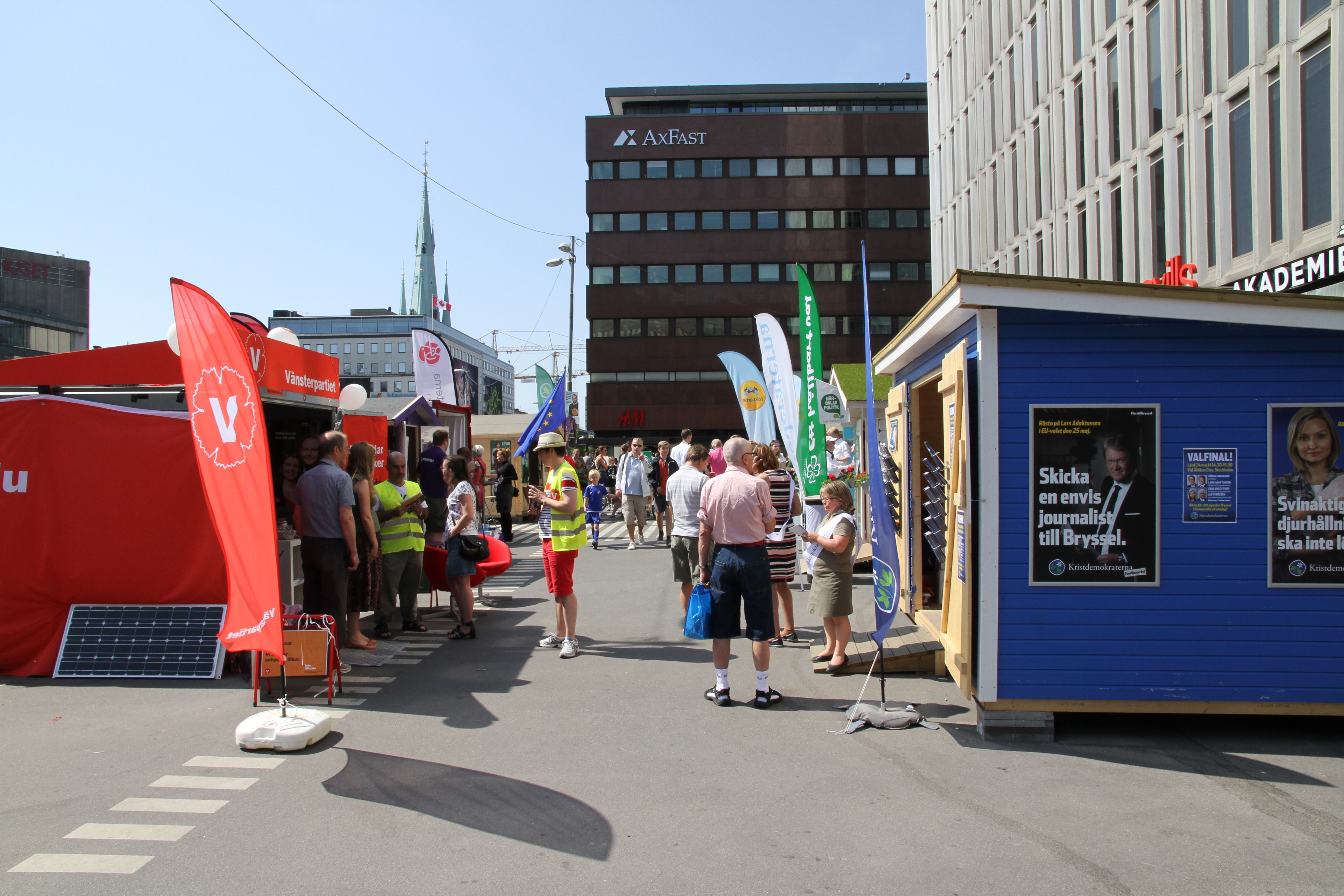 Val till Europaparlamentet 2014. Valrörelse. Valstugor vid Sergels Torg, Stockholm 24 maj 2014.